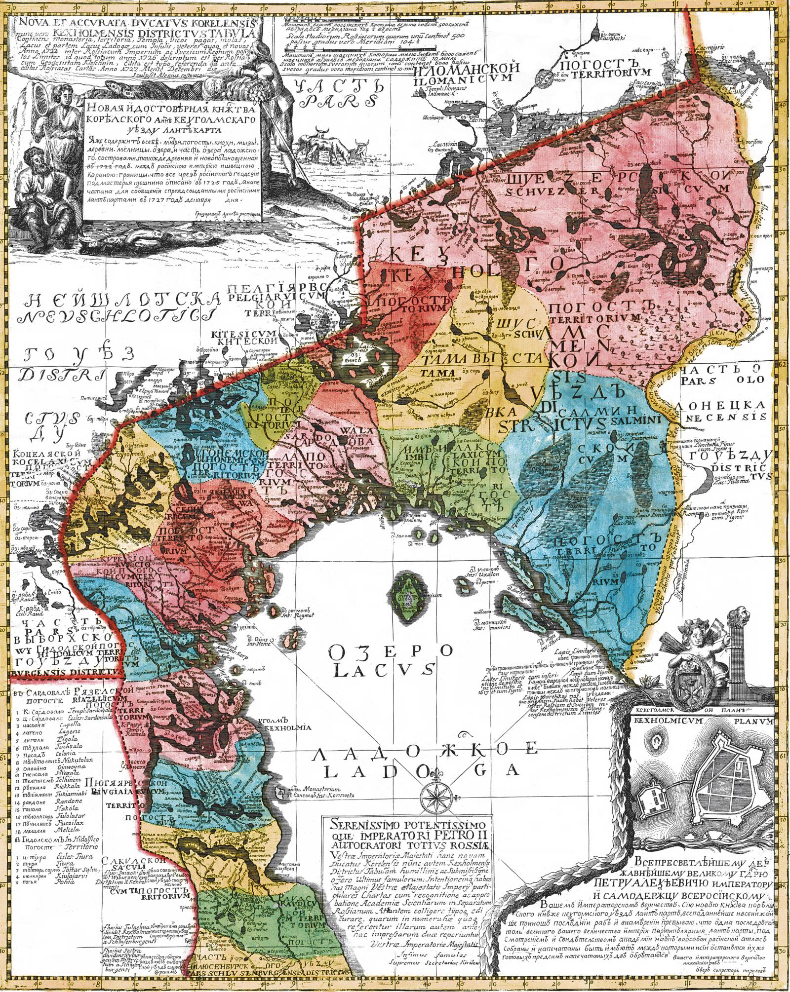 Карта Корельское княжество, 1725